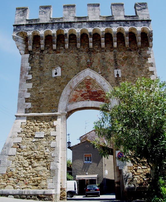 Lato esterno Porta di Ponente Pereta (GR)